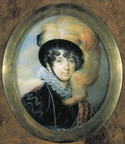 В.Н.Головина. Начало XIX века. Жерен.